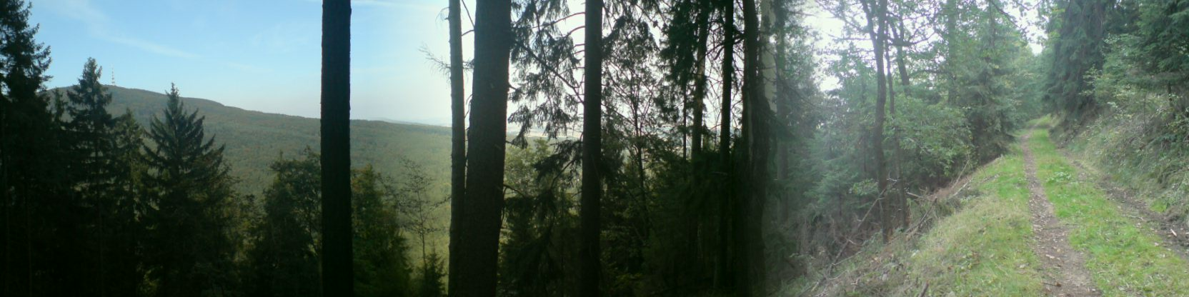 Na szlaku, Radunia - nucek